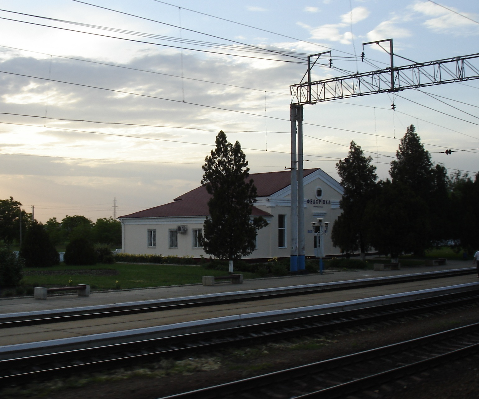 Здание ЖД-станции Фёдоровка